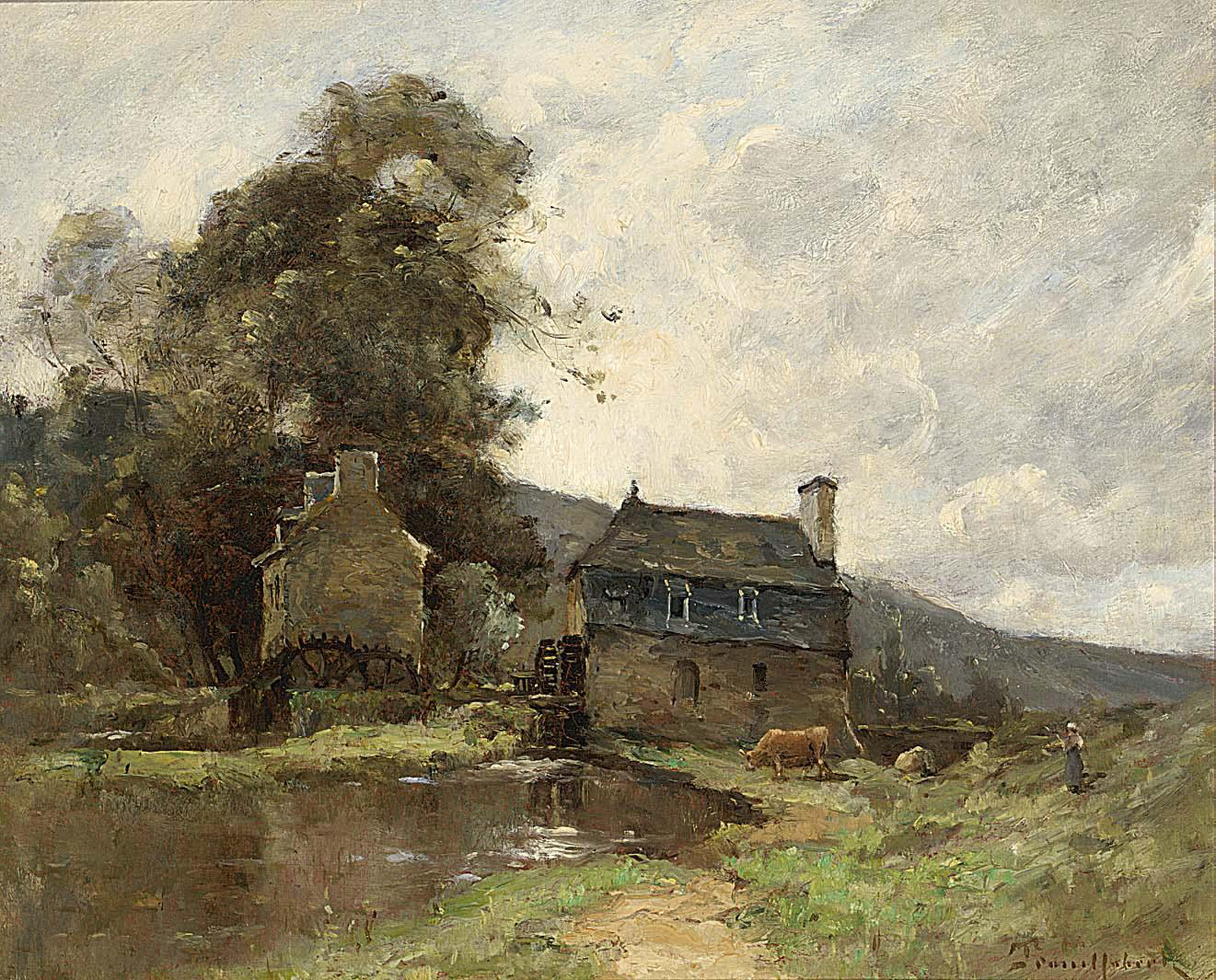 Gardienne de Vache prčs d'un moulin